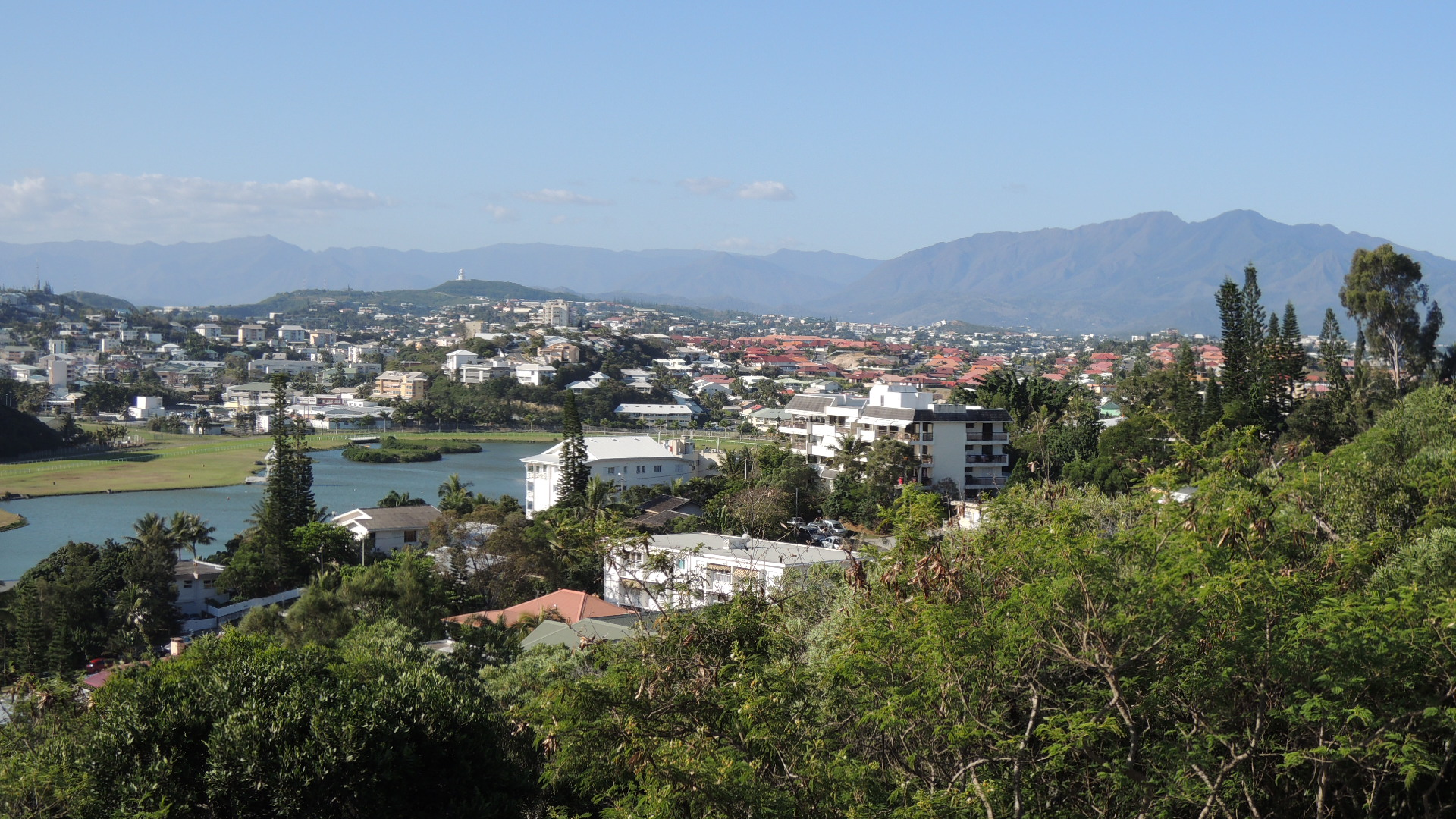 Versants ouest du Ouen Toro, dominant l'hippodrome Henri Milliard, à Nouméa